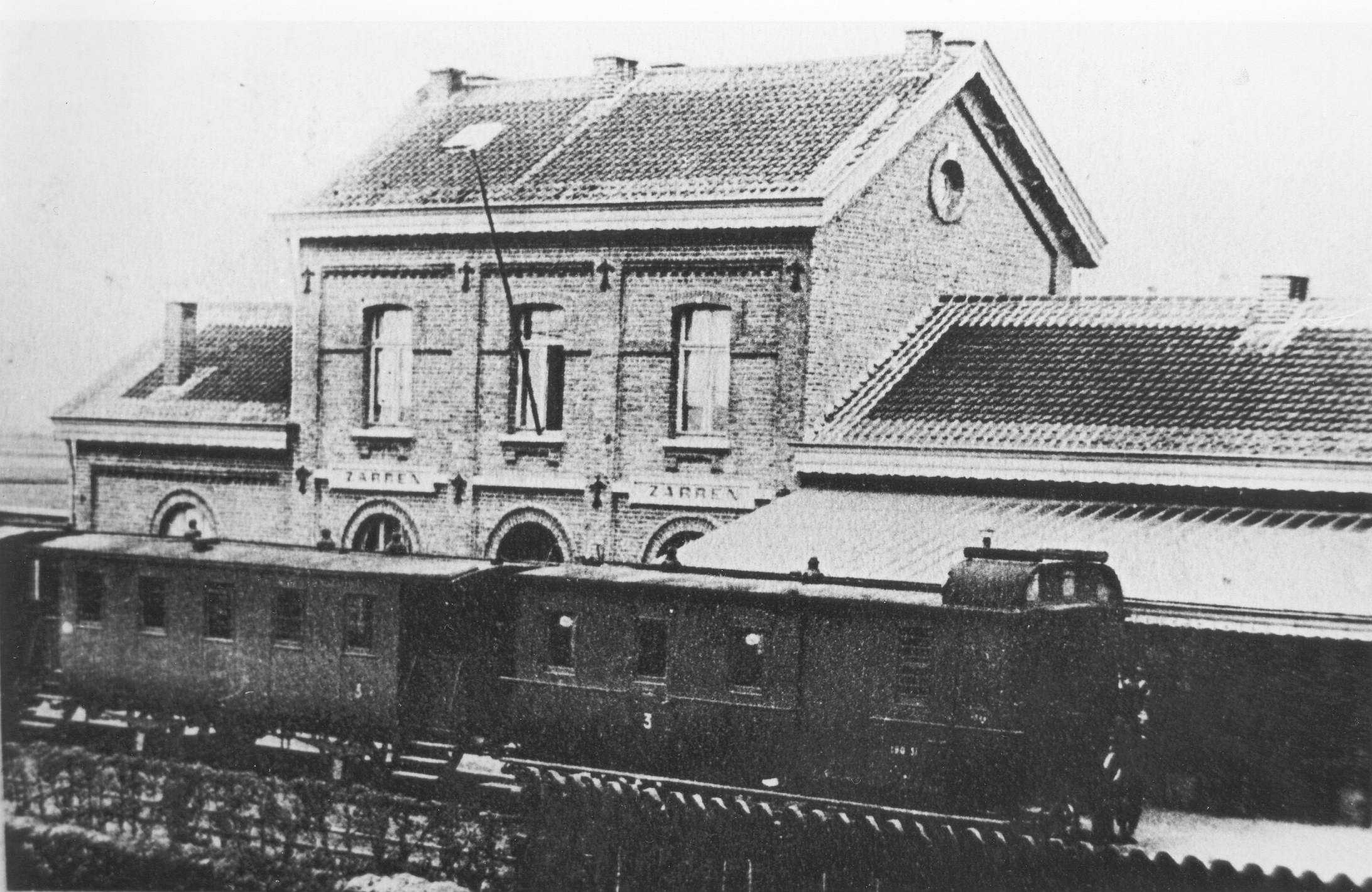 Station Zarren voor WO-1